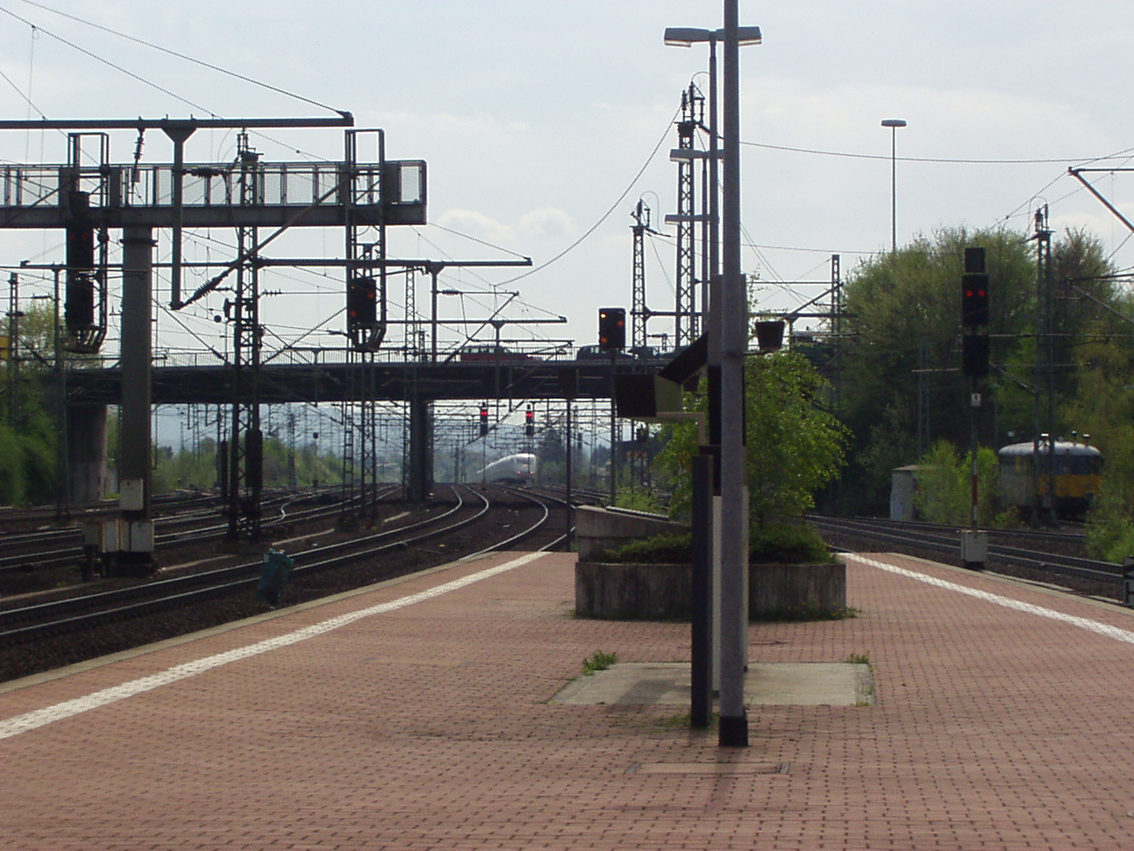 Kassel Bahnhof Wilhelmshöhe, Blick vom südlichen Ende der Bahnsteige